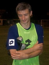 Мурат Магомедов